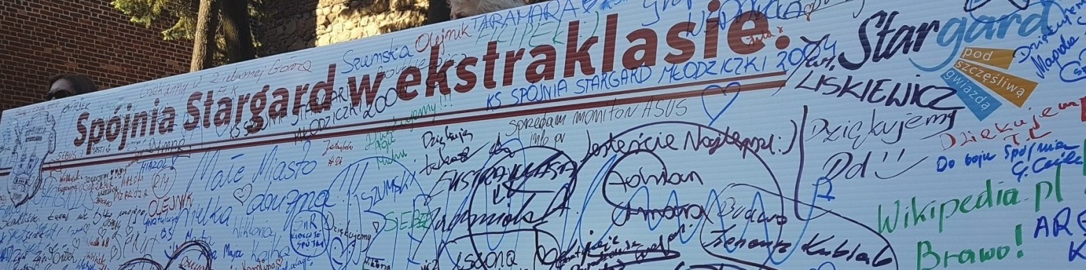 Tablica z dedykacjami dla Spójni Stargard (19.05.2018)